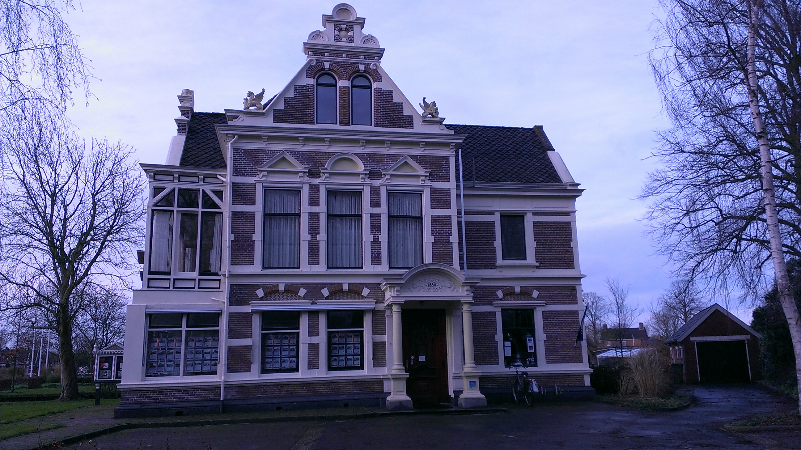 Villa Bellevue, Stationslaan 1, Loppersum